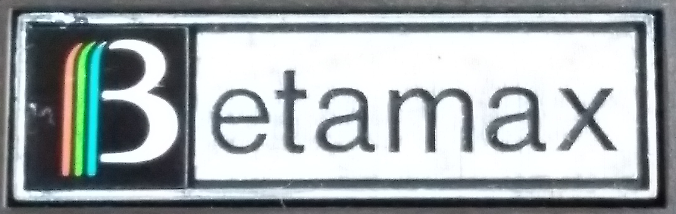 Betamax Logo fotografiert an einem Sony Sl-8000E Videorekorder von 1979.